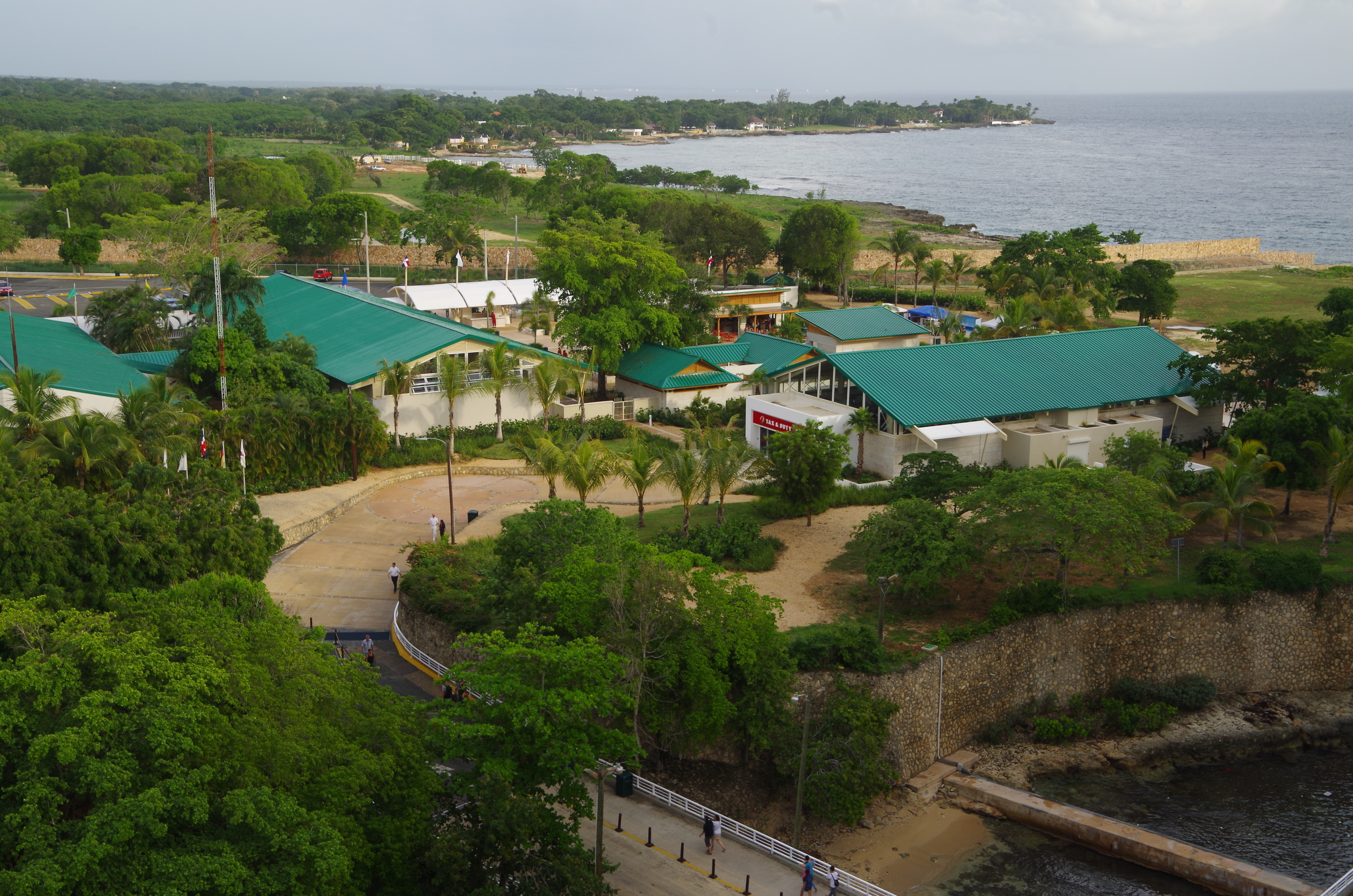 Passagierterminal im Hafen von La Romana